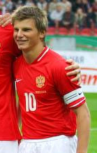 Andrei Arshavin, Russian footballer.